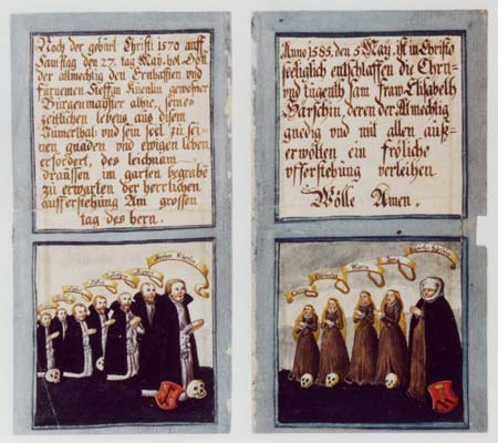 Das Kienlin-Epitaph aus der Jakobuskirche zur Erinnerung an Stephan Kienlin und seine Ehefrau Elisabeth Hirsch († 1585) wurde um 1870 bei Renovierungsarbeiten aus der Kirche entfernt und ist seitdem verschollen. Dies ist Abbildung einer Kopie auf Büttenpapier. (Maße: Original: ca. 2 × 1,25 m, Kopie:36 × 22 cm.) Waren die Flügeltüren geöffnet, so sah der Betrachter links Stephan Kienlin und seine Söhne, rechts seine Ehefrau und die Töchter. Ein Totenschädel kennzeichnete jeweils die Kinder, die bereits vor den Eltern verstorben waren.